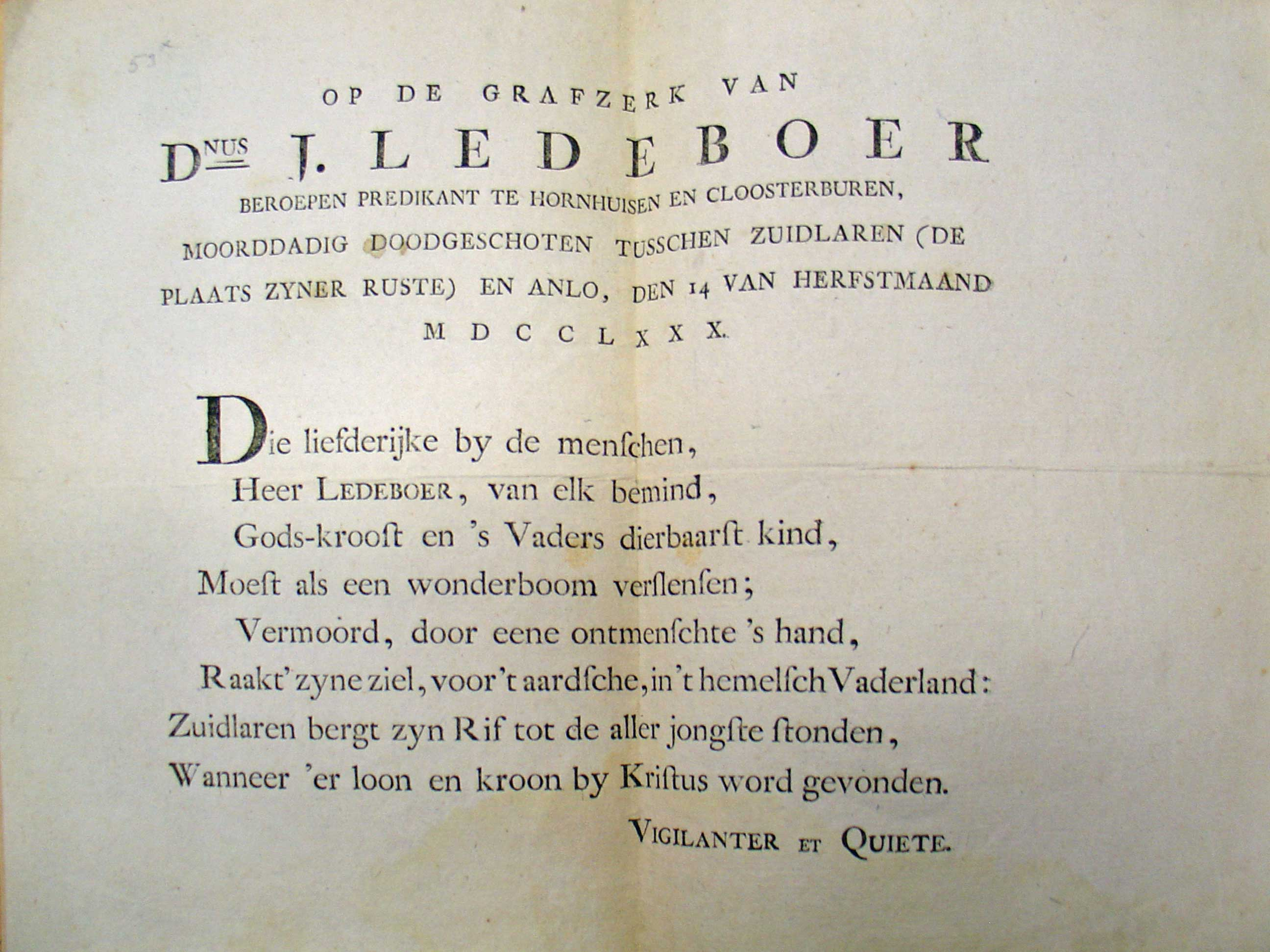 "Op de grafzerk van Johannes Ledeboer vermoord d.d. 14 september 1780